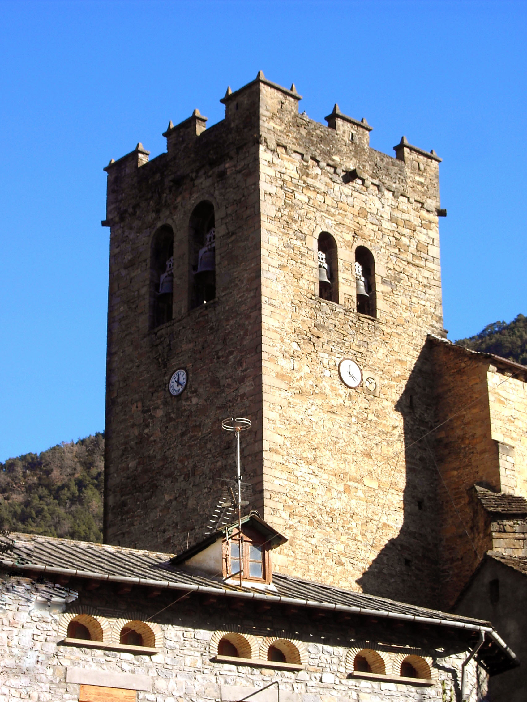 El campanario de la iglesia fortificada de Broto, levantado en el siglo XVI con el doble objetivo de ofrecer servicio religioso y a la vez permitir la defensa de esta villa pirenaica frente a las incursiones de los vasallos del rey de Francia durante el dilatado conflicto hispano-francés de ese siglo.